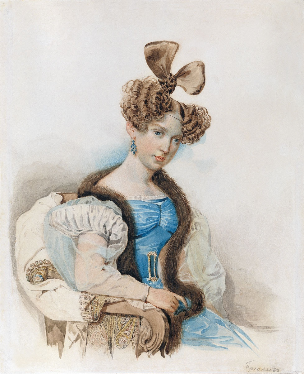 Александра Алексеевна Шварц, ур. Томилова (1815–1878)